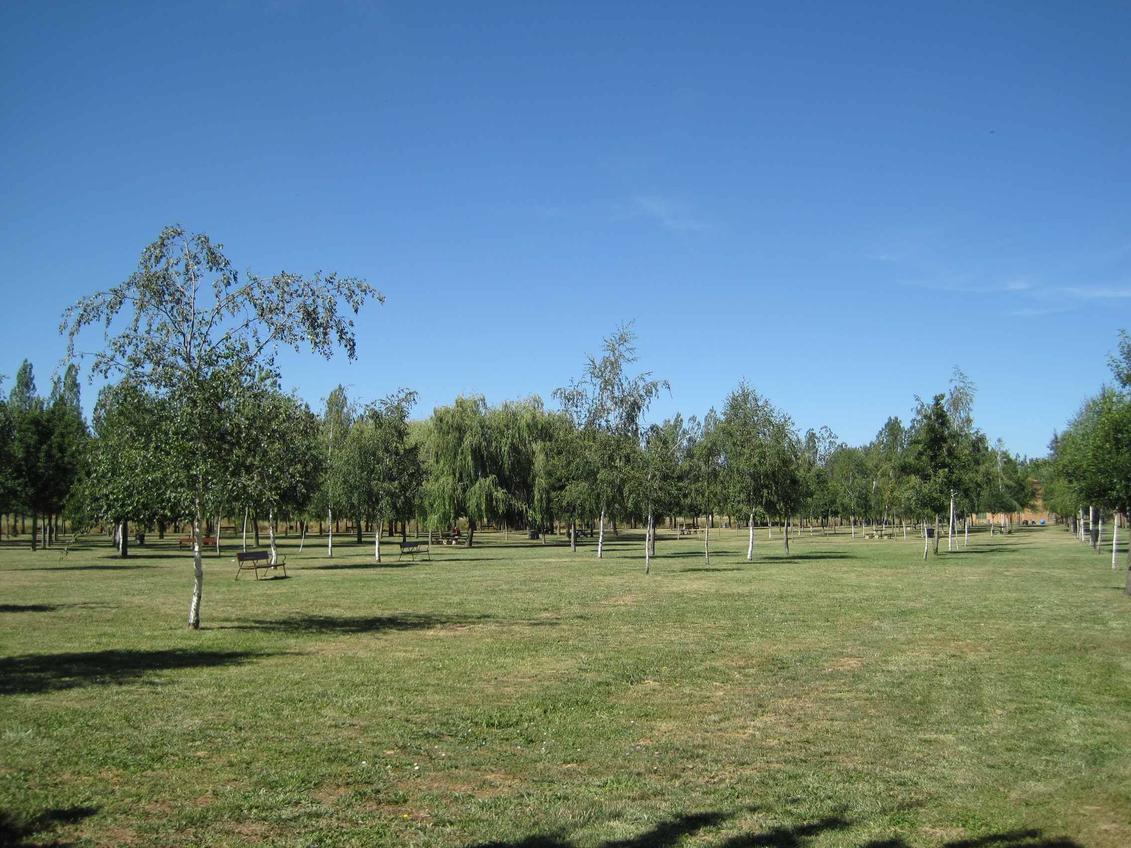 Vista parcial del parque de La Eragudina, en Astorga (León, España).